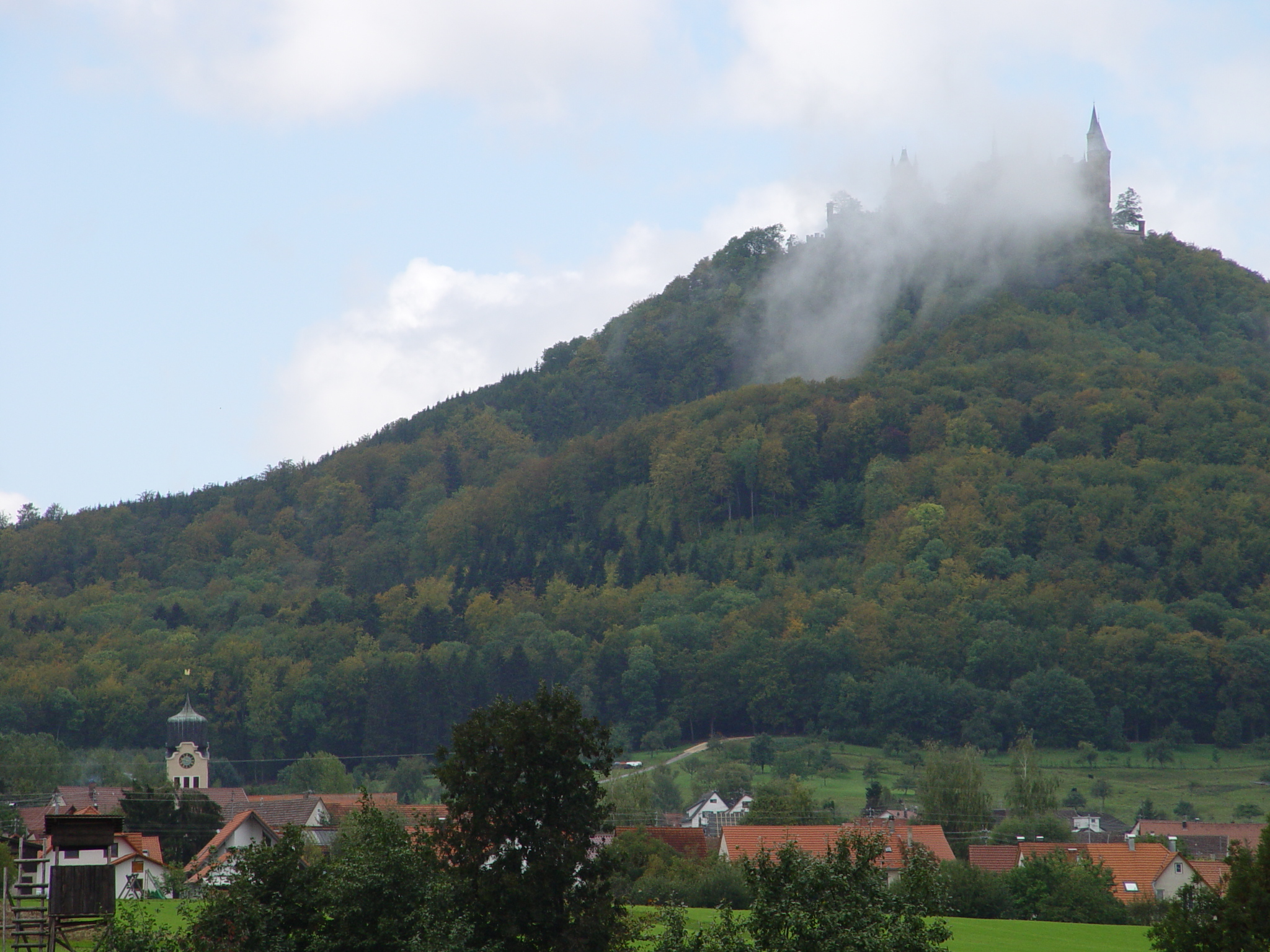 own work - Bild selbst gemacht Burg Hohenzollern mit Hechingen-Boll im Vordergrund Photographed by: Zollernalb